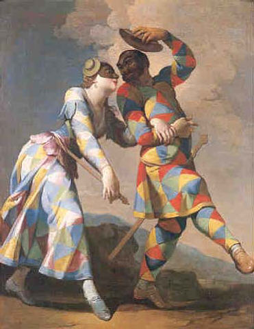 Arlecchino/Harlekin und Colombina. Öl auf Leinwand, 65 × 53,5 cm.